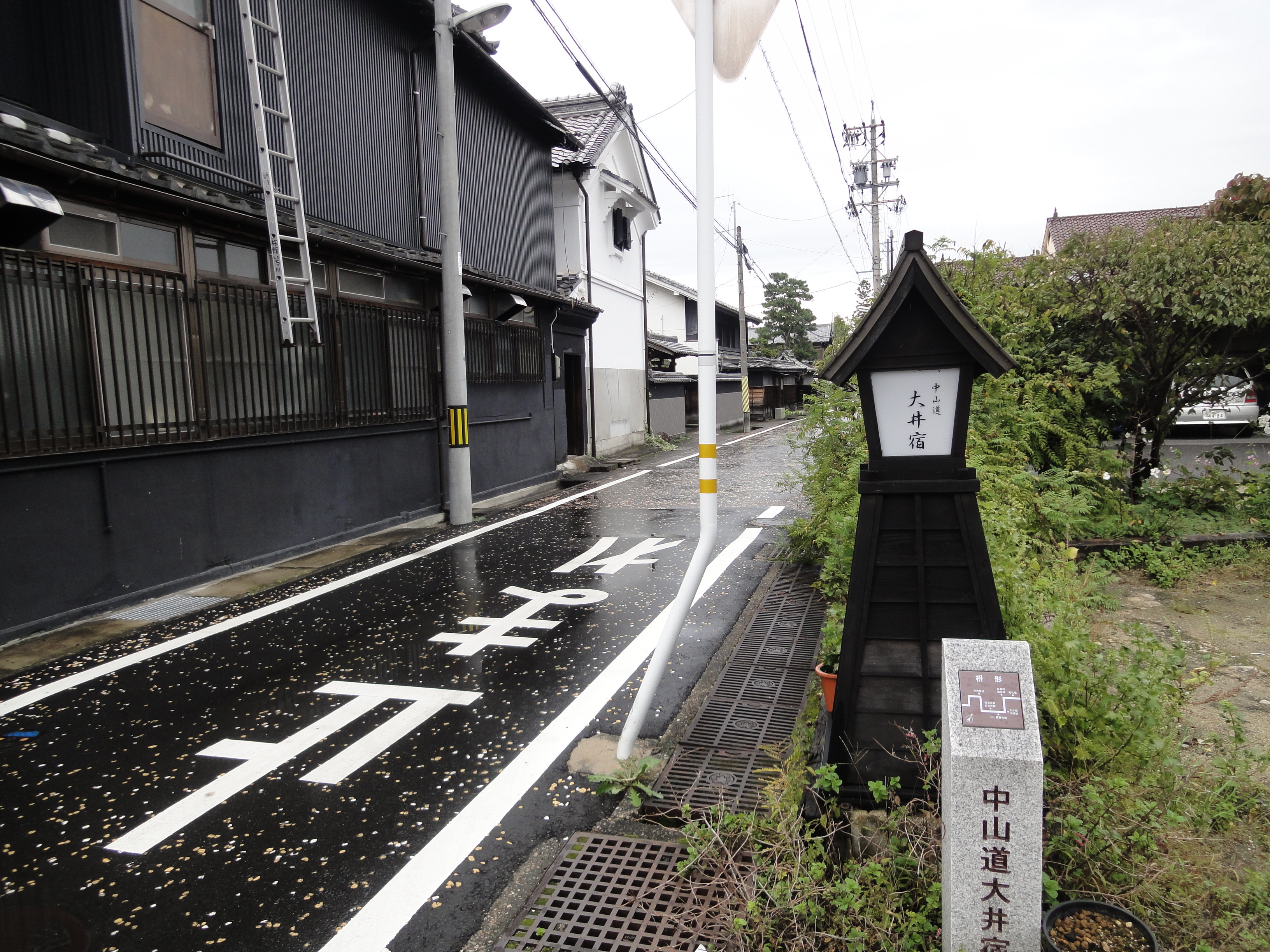 The road marker for Oi-juku.